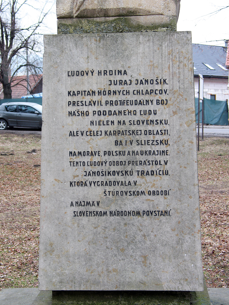 Text na podstavci skulptúry Juraja Jánošíka v Palúdzke - Liptovský Mikuláš